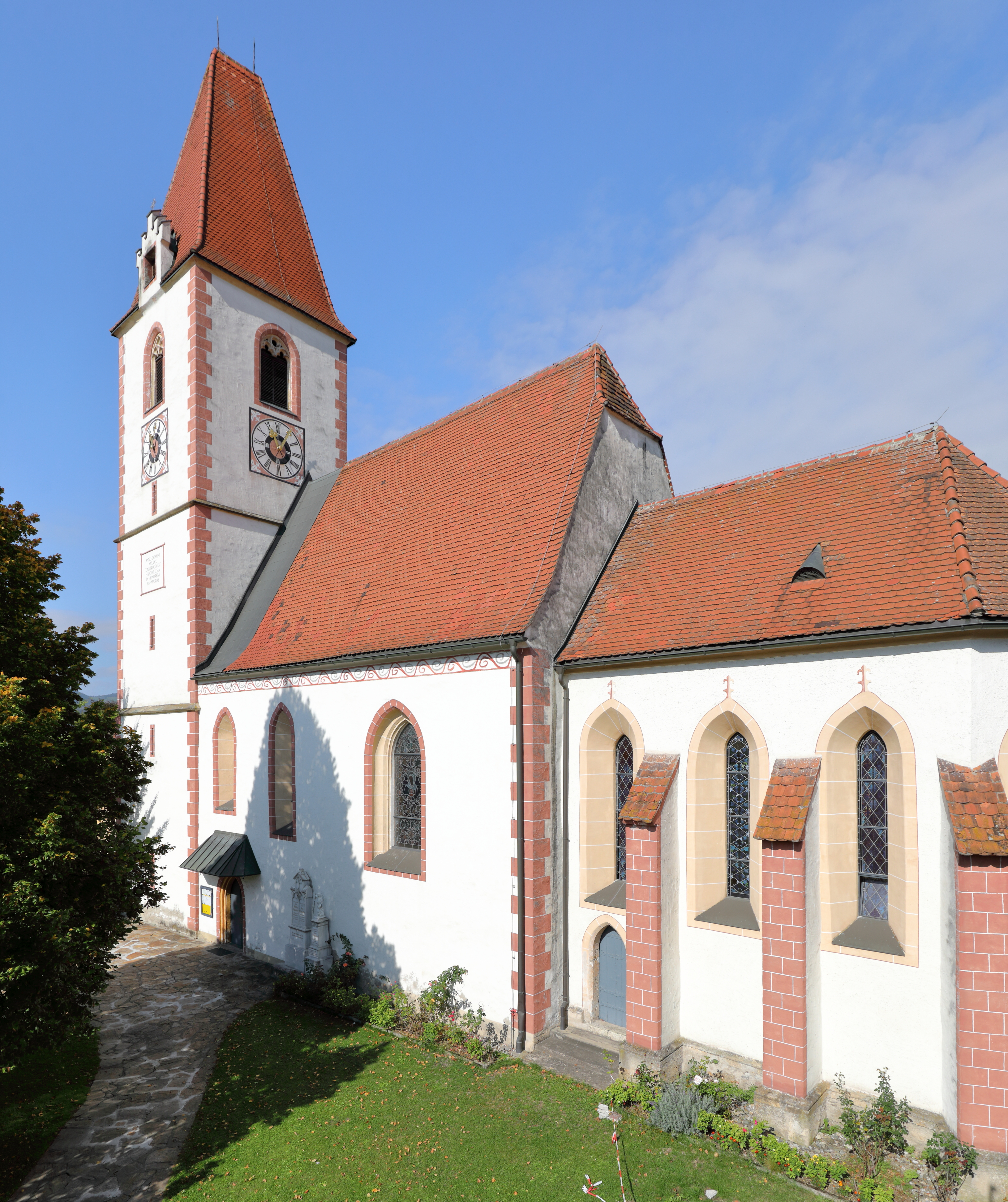 Ostansicht der röm.-kath. Pfarrkirche hl. Anna in der steirischen Marktgemeinde St. Marein im Mürztal.